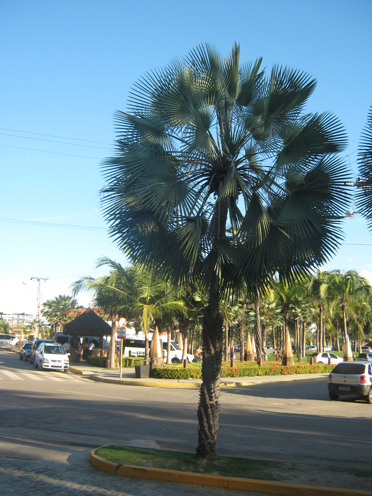 Carnaúba palm.